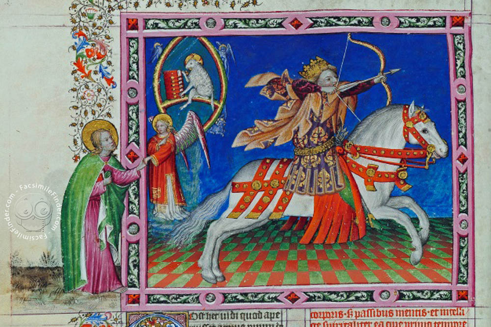 l Escorial, Bibliotheca Laurentina, ms. E. Vit. 5, f. 4r. Apocalyse figurée des ducs de Savoie. La grande vision de la cour céleste. (Jean Bapteur, 1428-1434)